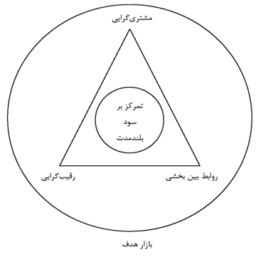 مدل نارور و اسلاتر 1990 معروف ترین مدل بازارگرایی یا بازار محوری